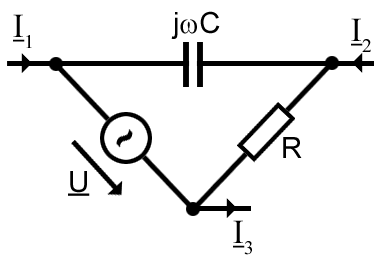 Elektrisches Netzwerk als Knoten mit zu- und abfließenden Strömen (selbst erstellt / GNU-FDL)